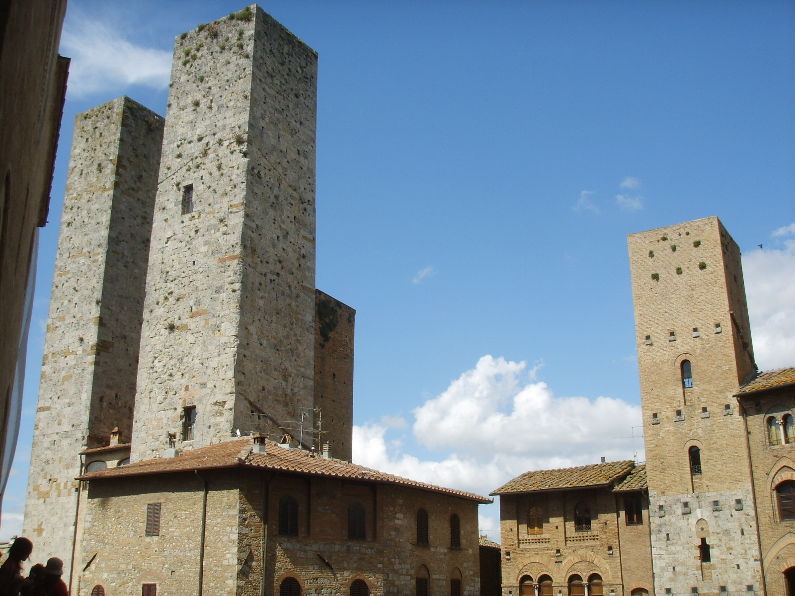 San gimignano piazza duomo 08 torre